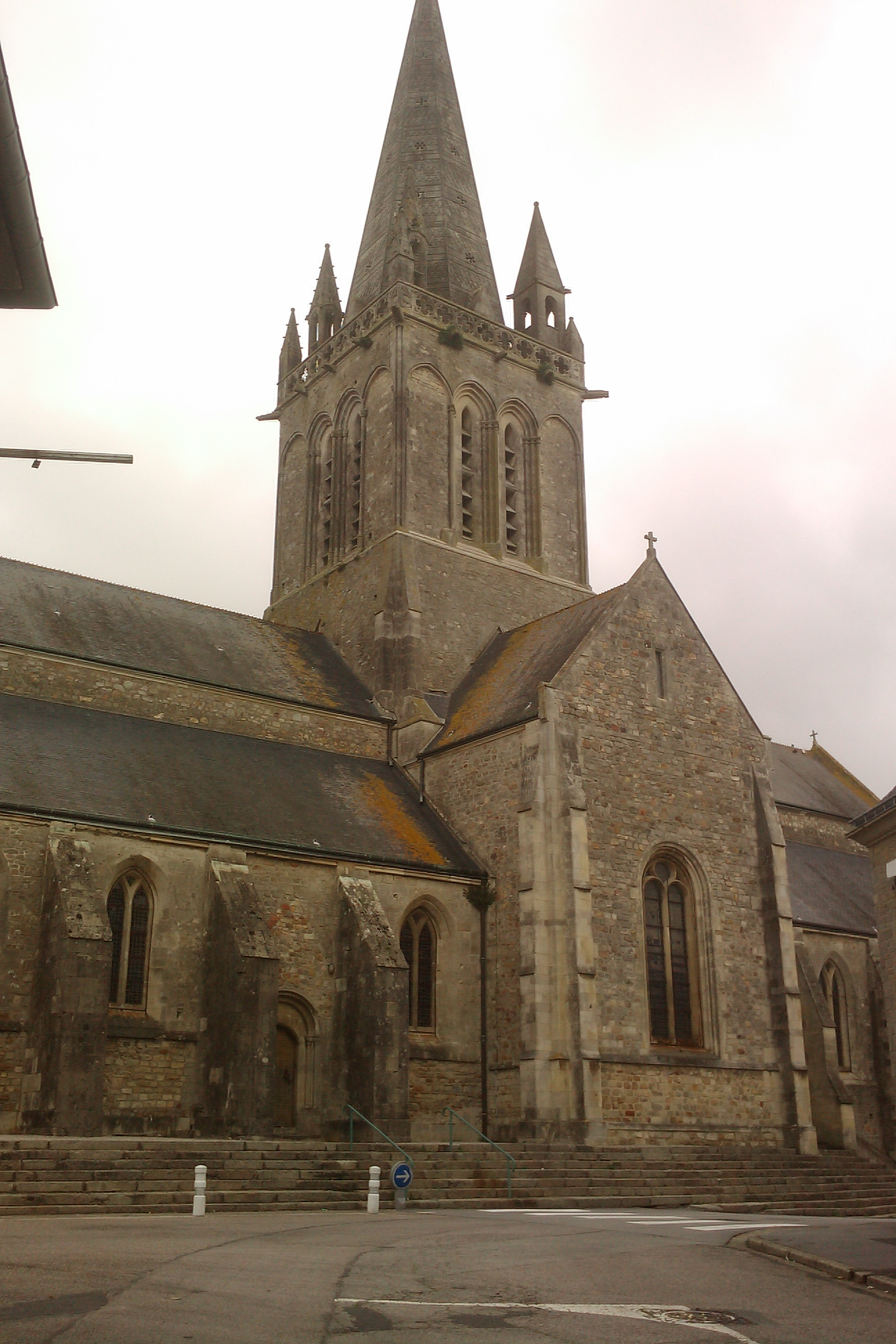 Église Saint-Jacques de Montebourg